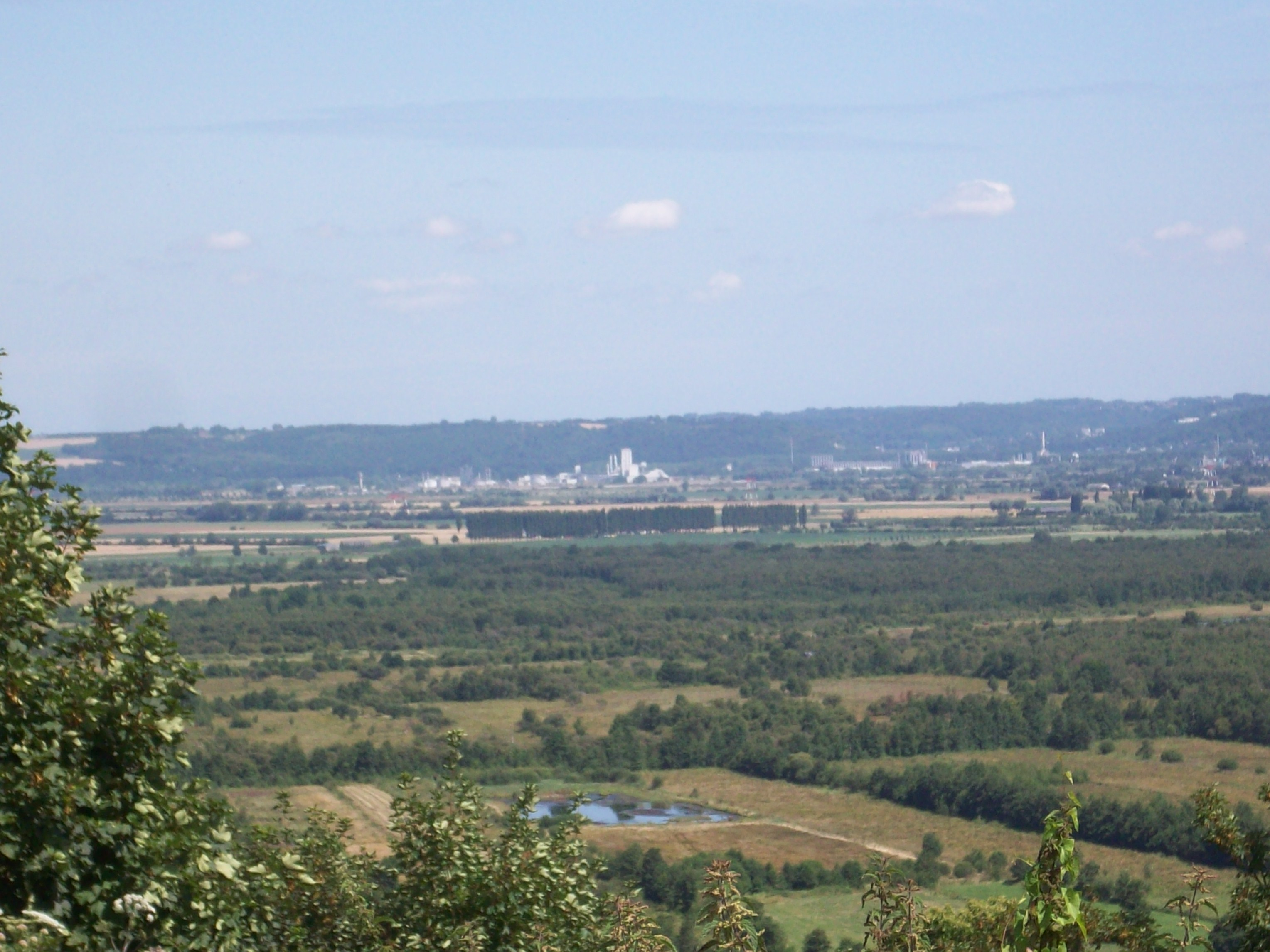 Vue depuis Bouquelon.